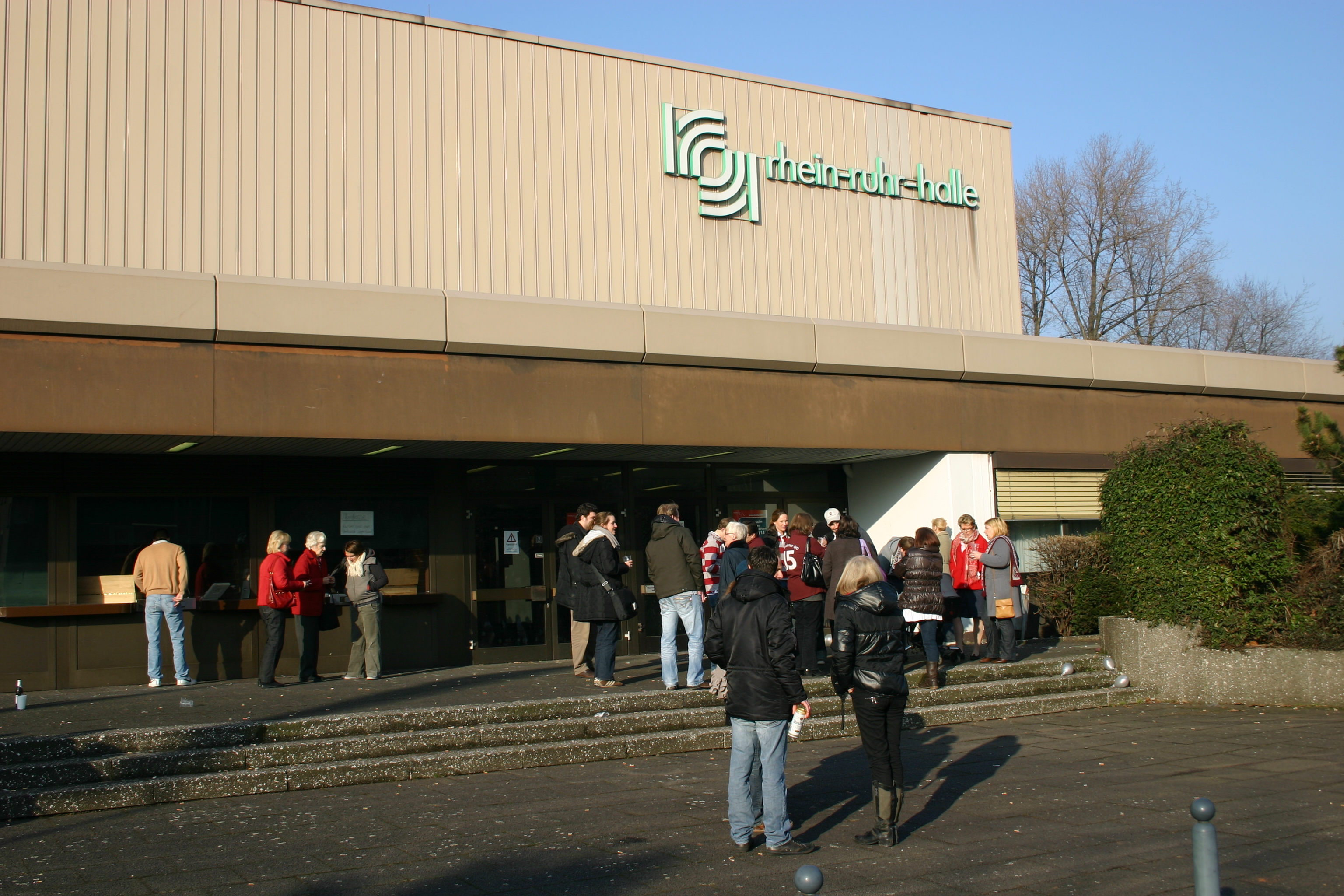 Rhein-Ruhr-Halle in Duisburg (Südostseite der Halle). (Originalfoto, unbearbeitet; fotografiert von BlackIceNRW.)